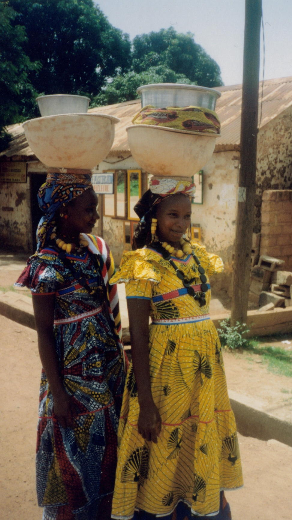 Femmes peuls au marché de Boundiali, au nord de la Cote d'Ivoire